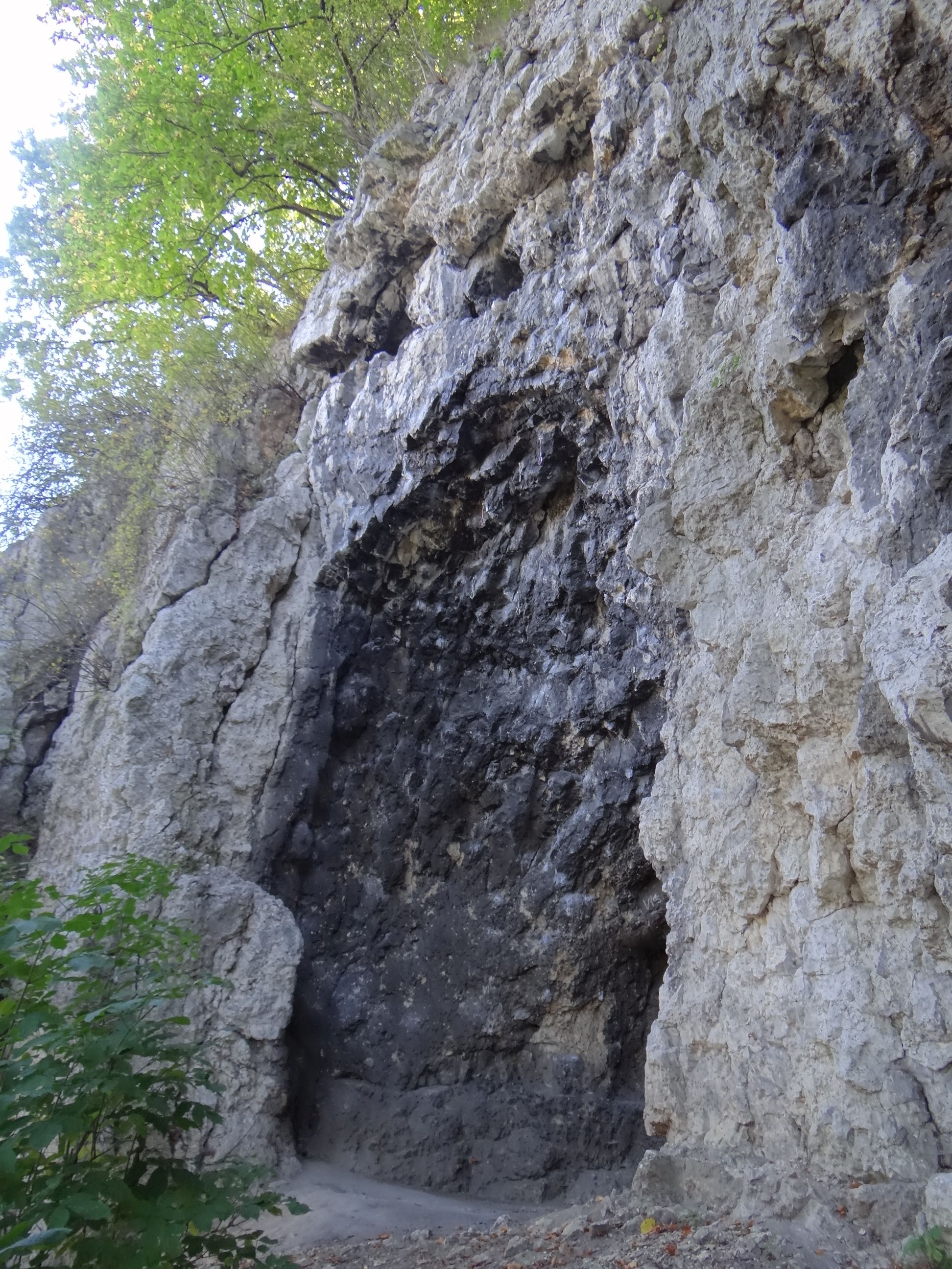 Schronisko w Winnicy II